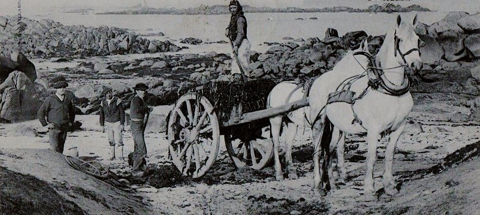 Plouescat : goémoniers sur la grève du Froutven vers 1925 (carte postale Villard)